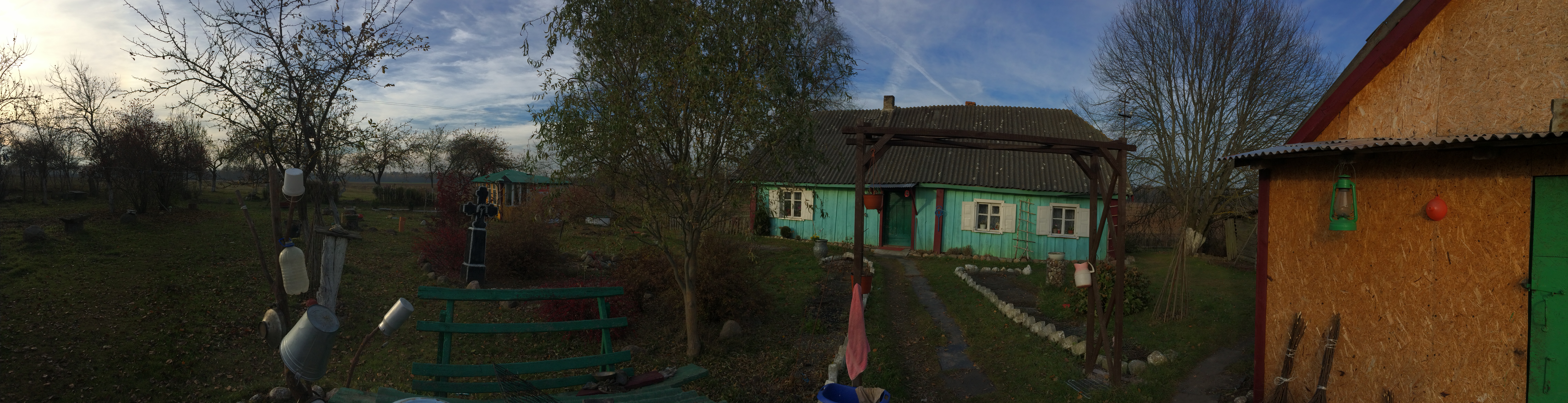 Sodyba Vincentavos kaime